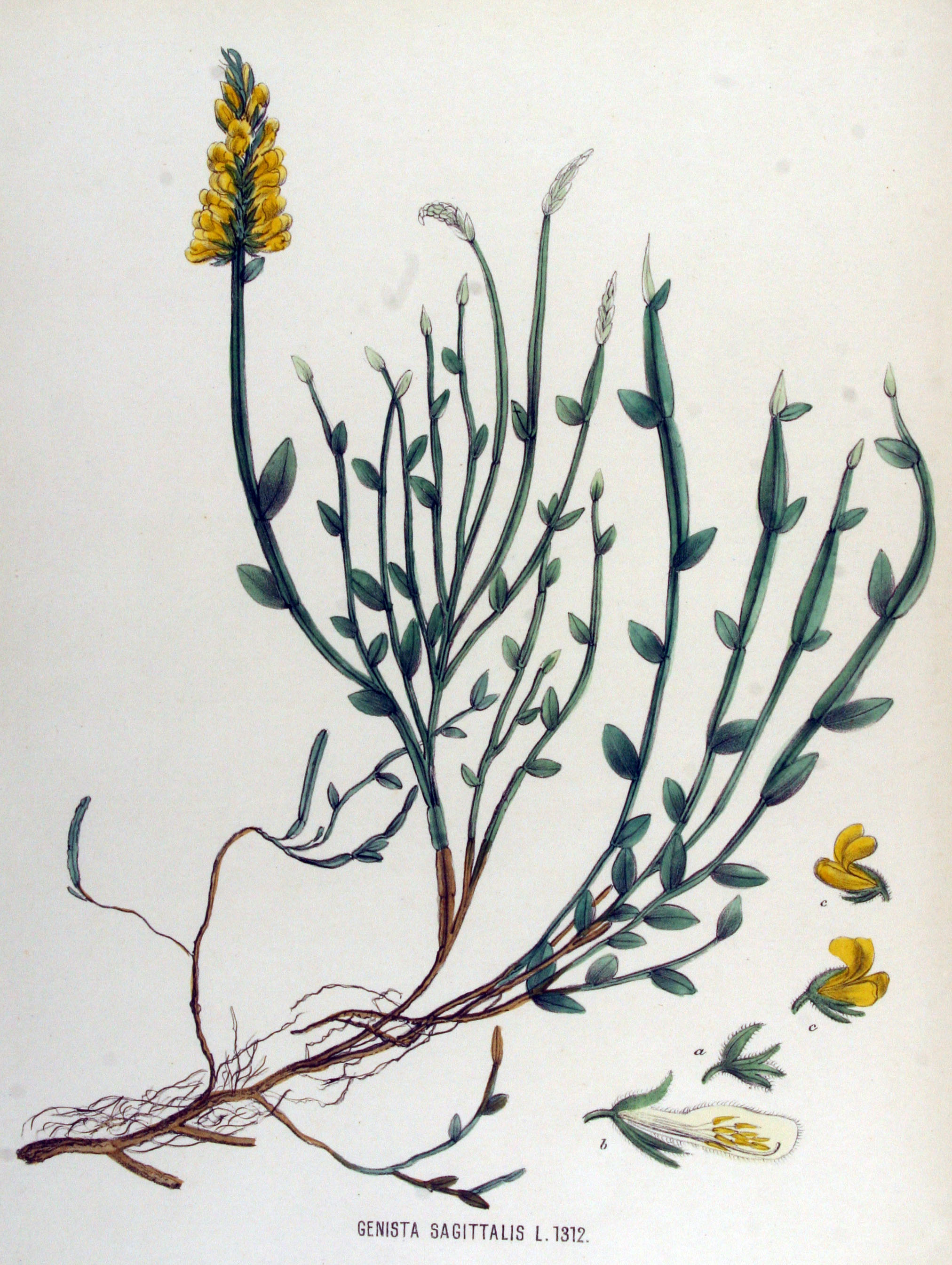 Genista sagittalis (Syn. Genistella sagittalis (L.) Gams)